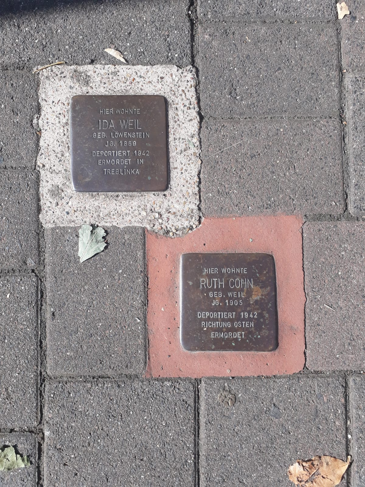 IdaWeilBadEms